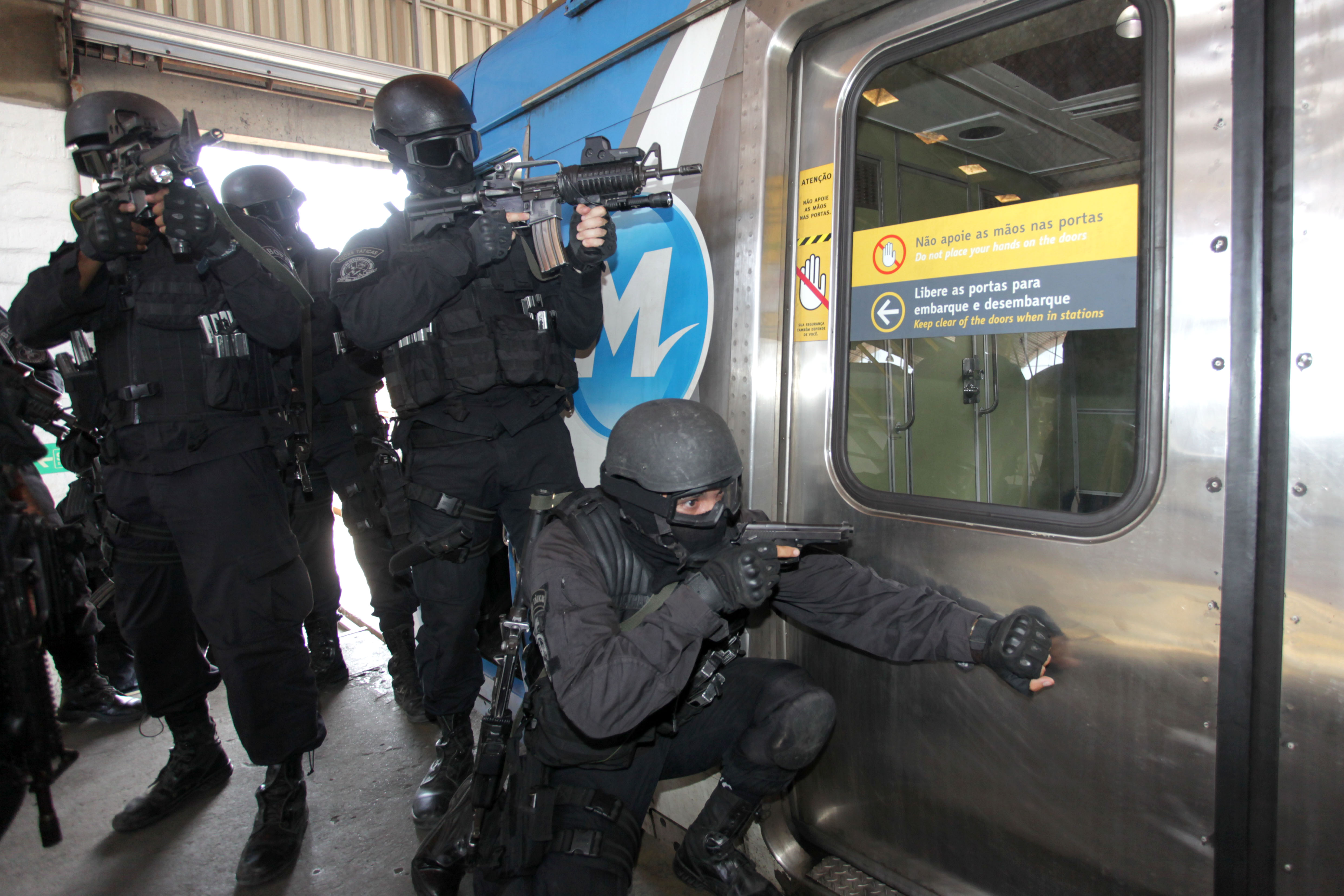 Bope realiza treinamento no Metrô com foco nas Olimpíadas de 2016.​